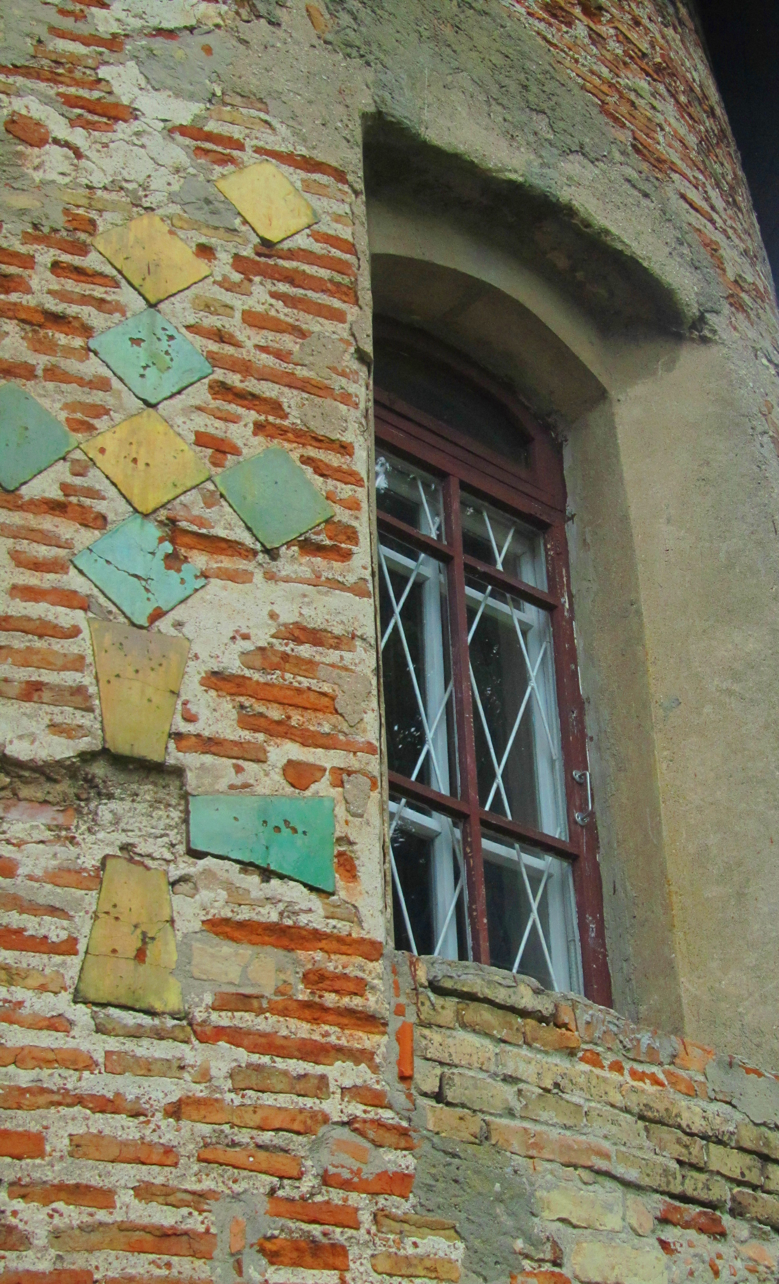 Беларуская (тарашкевіца): Барысаглебская (Калоская) царквадэкаратыўнае аздабленьне царквы:каменны і маёлікавы дэкор на фасадахфрагмэнт арнамэнтальнага дэкору падлогіфрагмэнты жывапісу ў інтэр’еры This is a photo of Belarusian heritage monument. Reference number: 410Г000004 ( WLM)